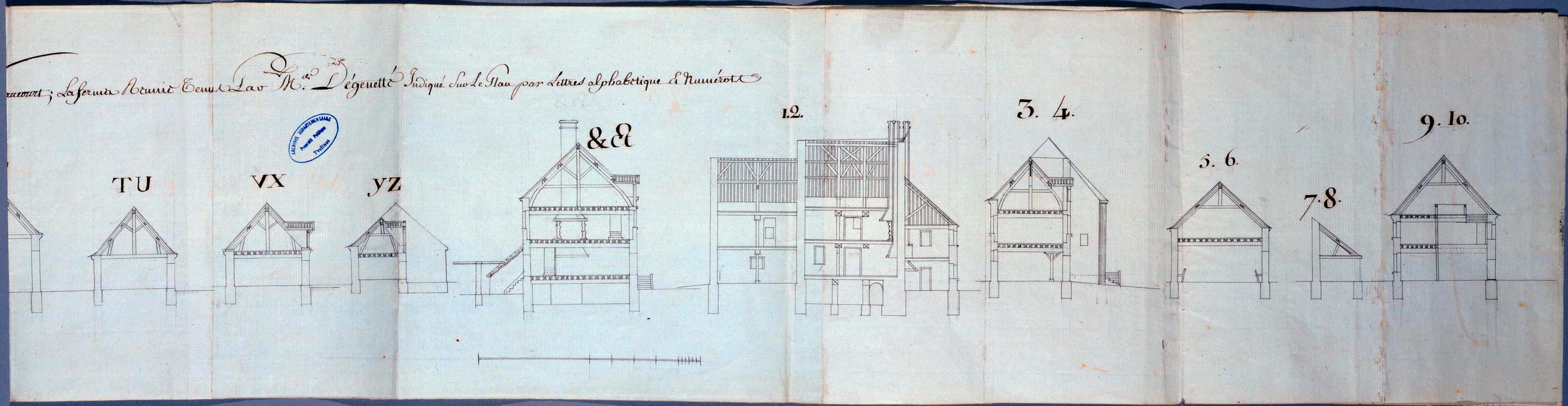 texte: Profils des differents Bâtimens qui Compose les fermes de Blénie et Bélébas et L’hôtel Dieu à Guyancourt; Plans de la ferme Bel Ebat (l’une des sept fermes de Guyancourt et Hôtel Dieu à Guyancourt dans le département français des Yvelines (page 2). 24 × 186 cm (9.4 × 73.2 in)